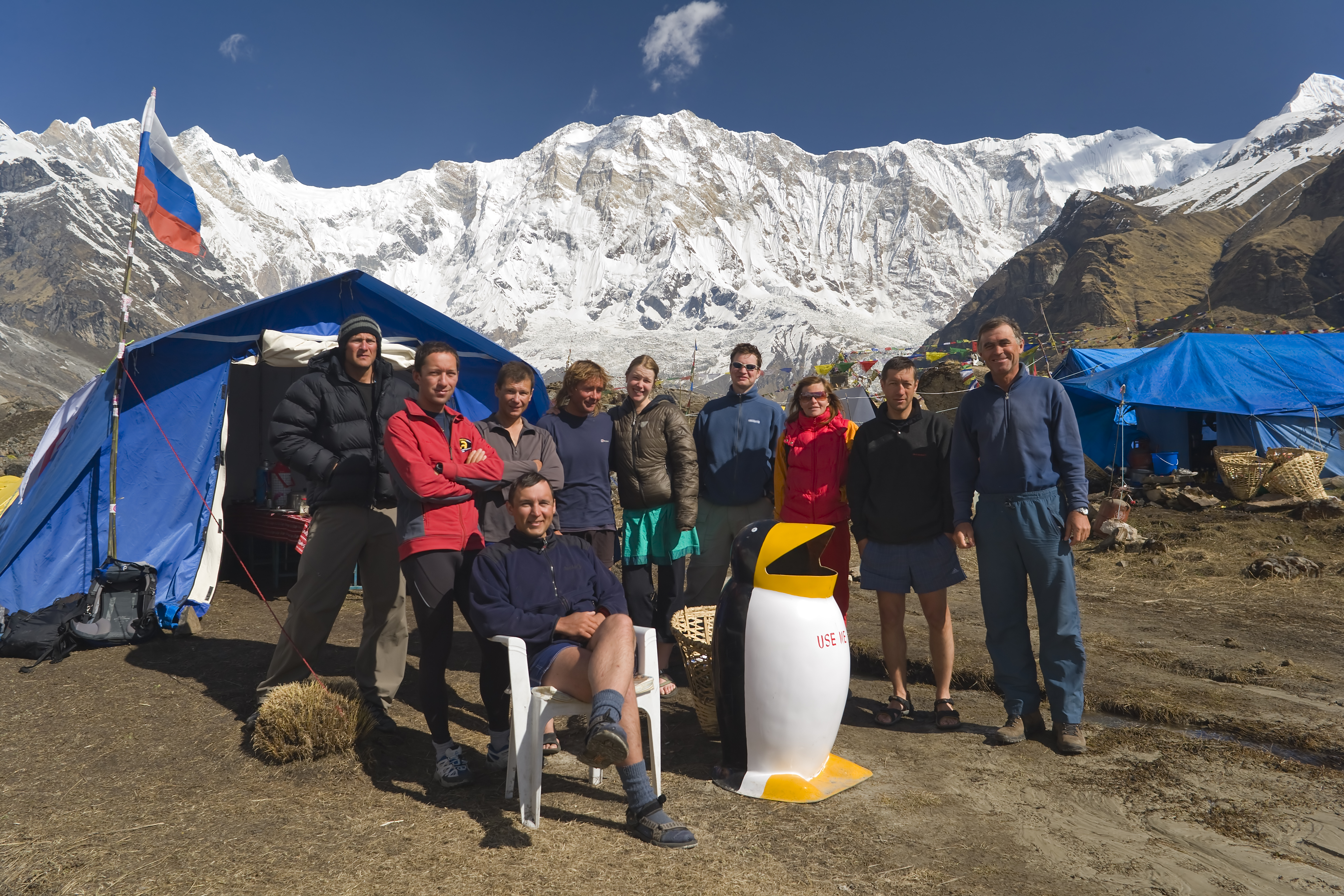 Часть участников экспедиции на Аннапурну весной 2008. Трое наших ребят уже ушли вниз. Дон Бовье сидит в палатке и фотографироваться не вышел. Слева стоит высотный оператор Дона Бовье (имени не запомнил) В красной флиске Хория Калибасану. На стуле сидит Дима Синёв. За ним стоит Лёша Болотов. Правее Иньяки Очоа де Ольза со своей подругой. Далее Олег (фамилии не знаю) журналист из Прибалтики. Лена - трекер из Москвы. Далее Александр Лутохин - альпинист. Замыкает ряд Сергей Богомолов.